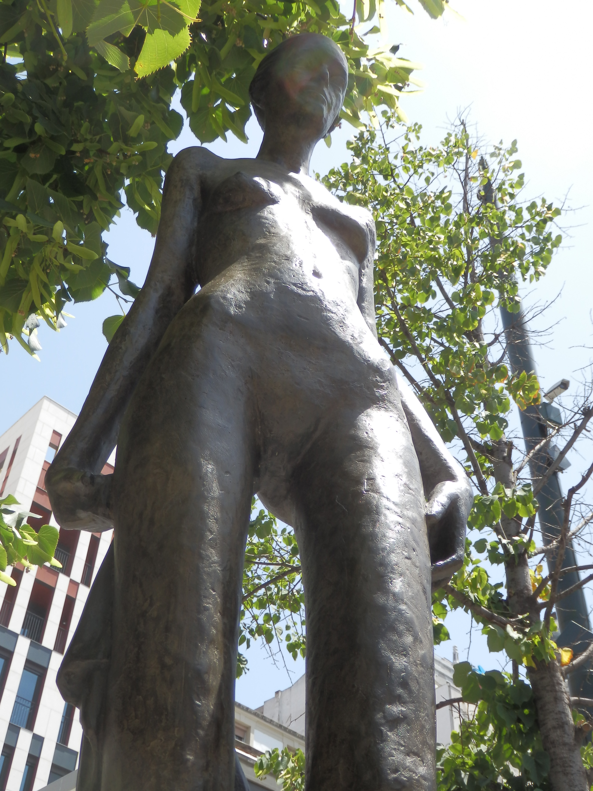 Escultura de Alberto Gómez Ascaso titulada Mujer con manto azul. Donada por el autor a la ciudad de Zaragoza en 2007.